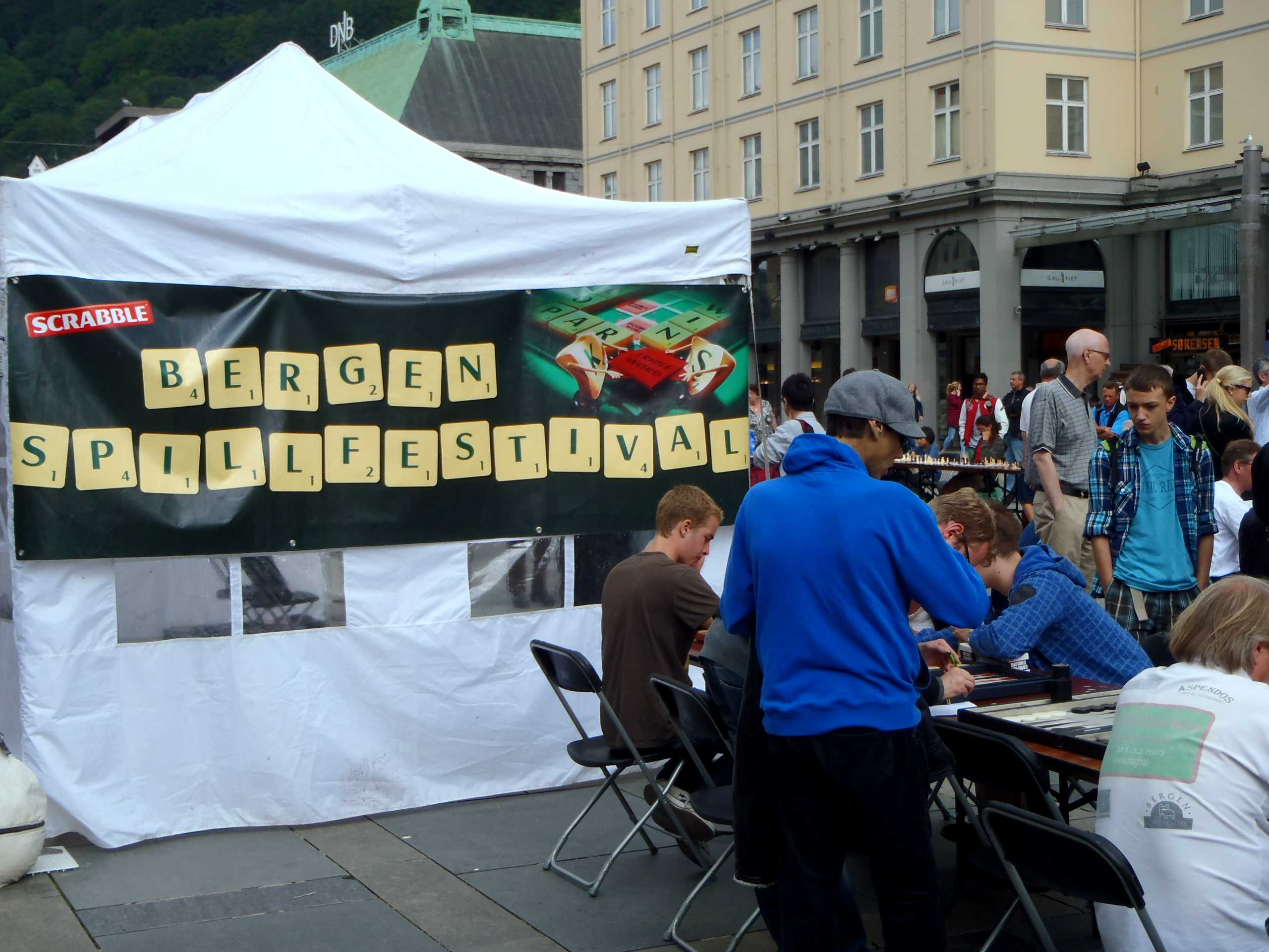 Fra Bergen Spillfestival 2012.